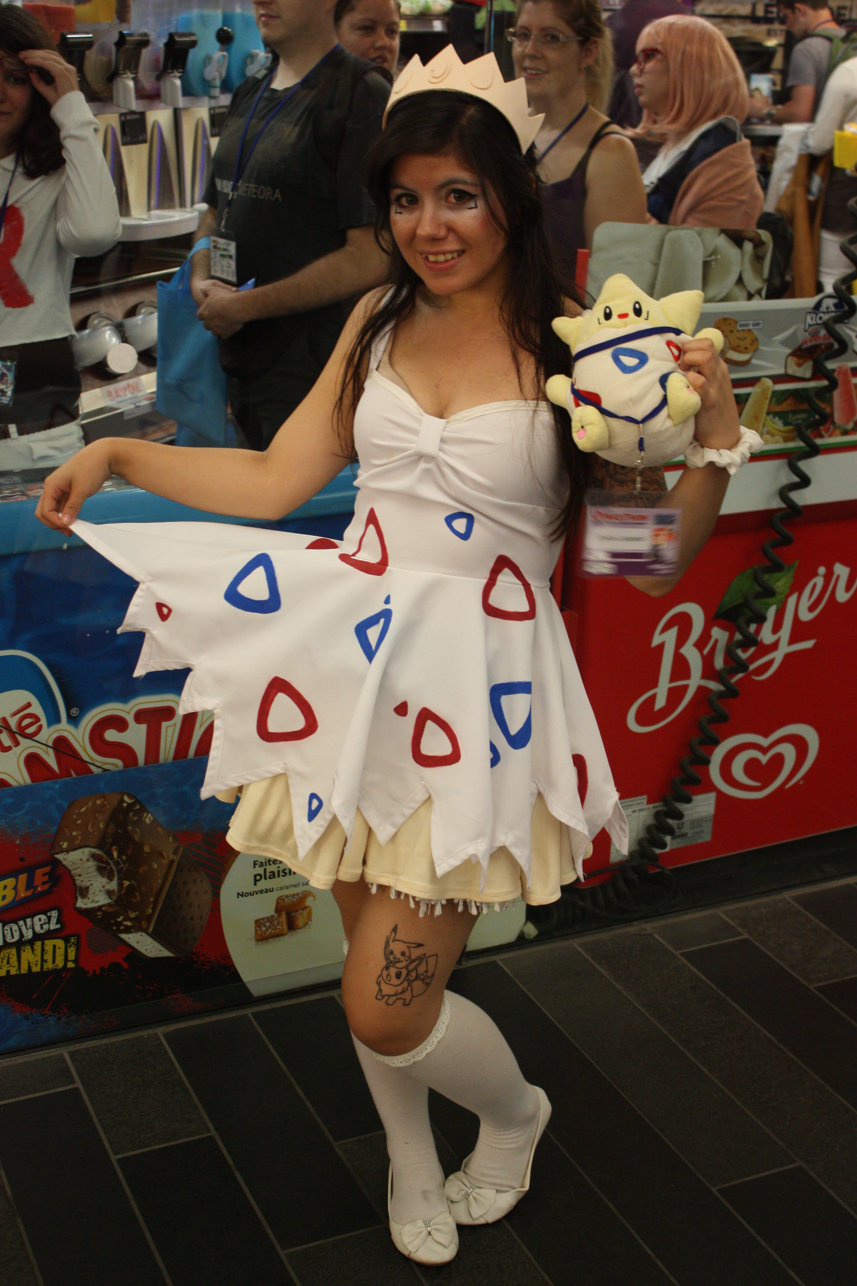 Otakuthon 2014: Togepi